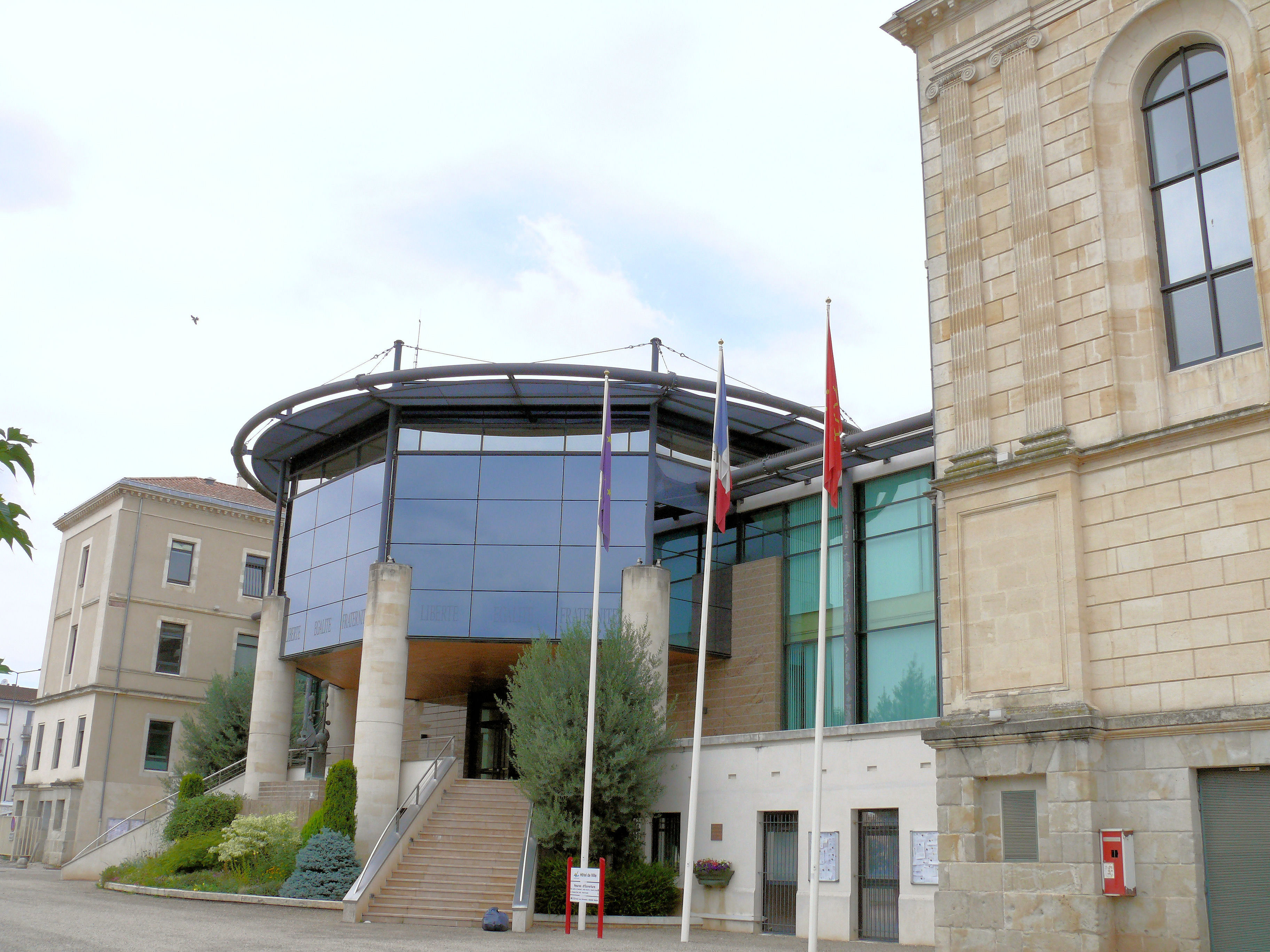 Villeneuve-sur-Lot - Hôtel de ville dans l'ancien collège